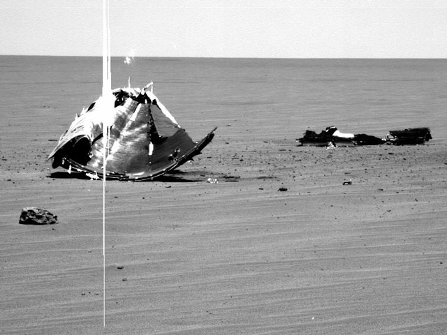 中文（中国大陆）: 机遇号热护盾